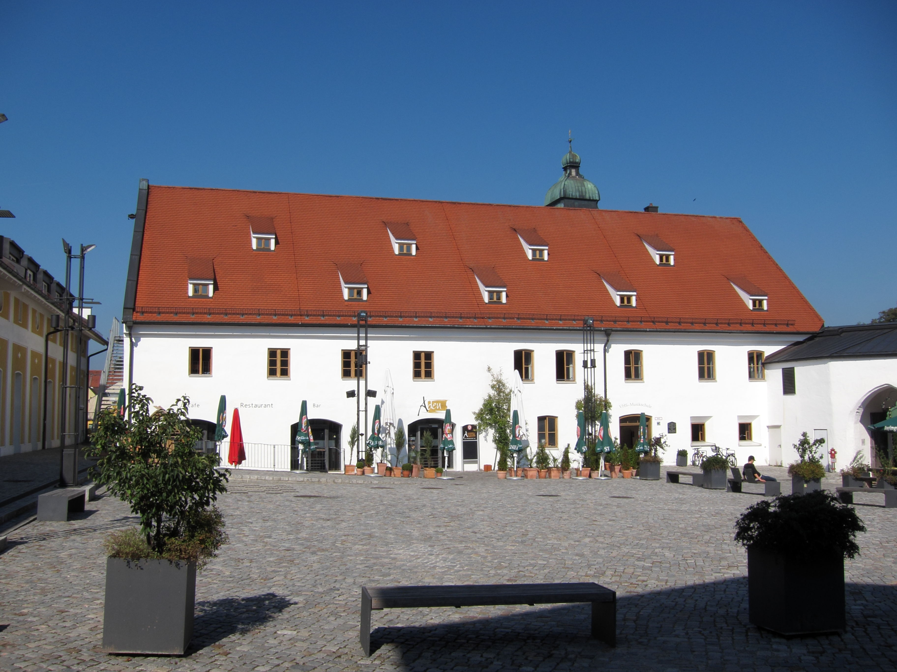 Bahnhofstraße 20; Ehem. Kloster-Bauhof, im 19. Jh. erneuerte Vierflügelanlage; spätgotischer gewölbter Torbau, bez. 1495; ehem. Wohn- und Verwalterhaus (Nordtrakt), Satteldachbau, im Erdgeschoß des Ostteils spätmittelalterlich, sonst 2. Hälfte 19. Jh. (D-1-75-115-13).